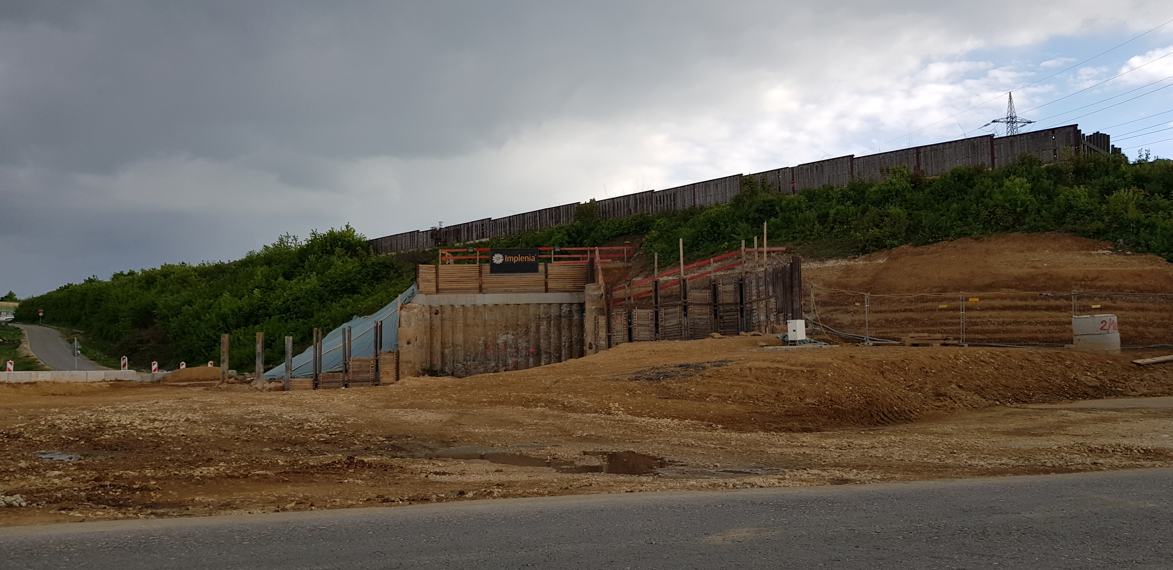 Bohrpfahlwand am künftigen Westportal des Tunnels der Güterzuganbindung. Im Hintergrund ist die A8 zu erkennen.